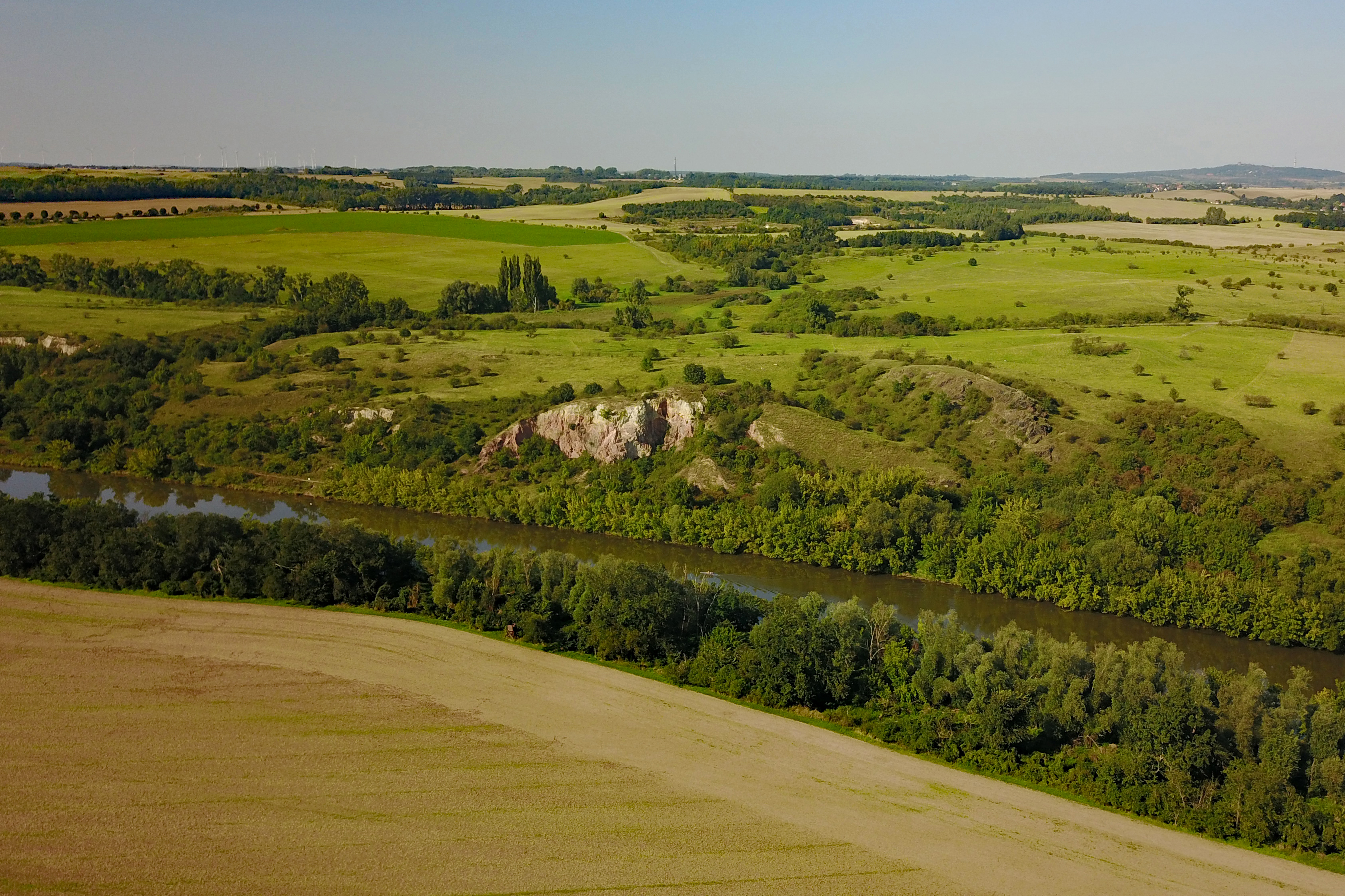 Brachwitzer Alpen (Luftbild, Sachsen-Anhalt)